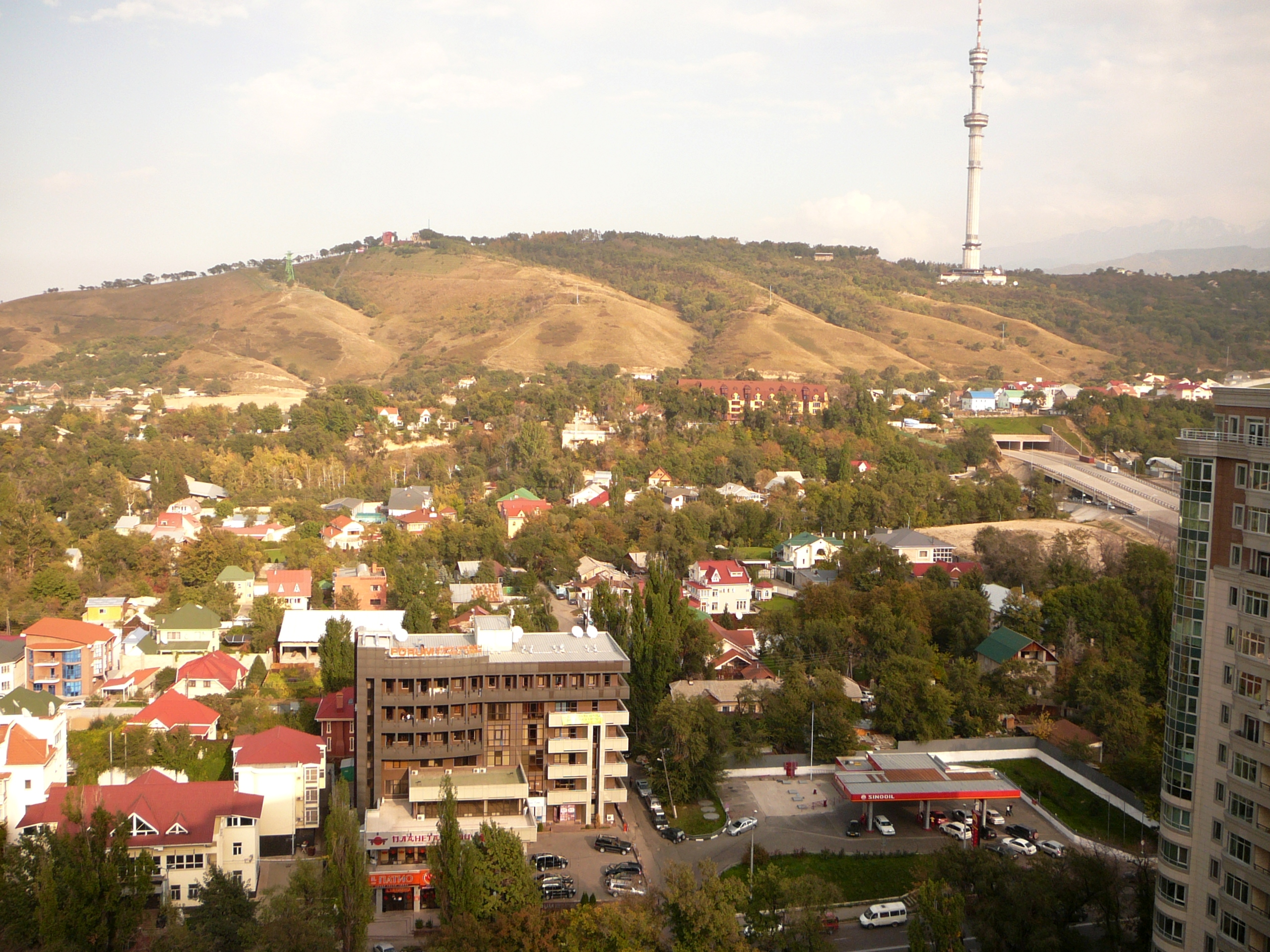 Вид на Кок-Тюбе с многоэтажного здания находящегося на пересечении проспектов Аль-фараби и Достык